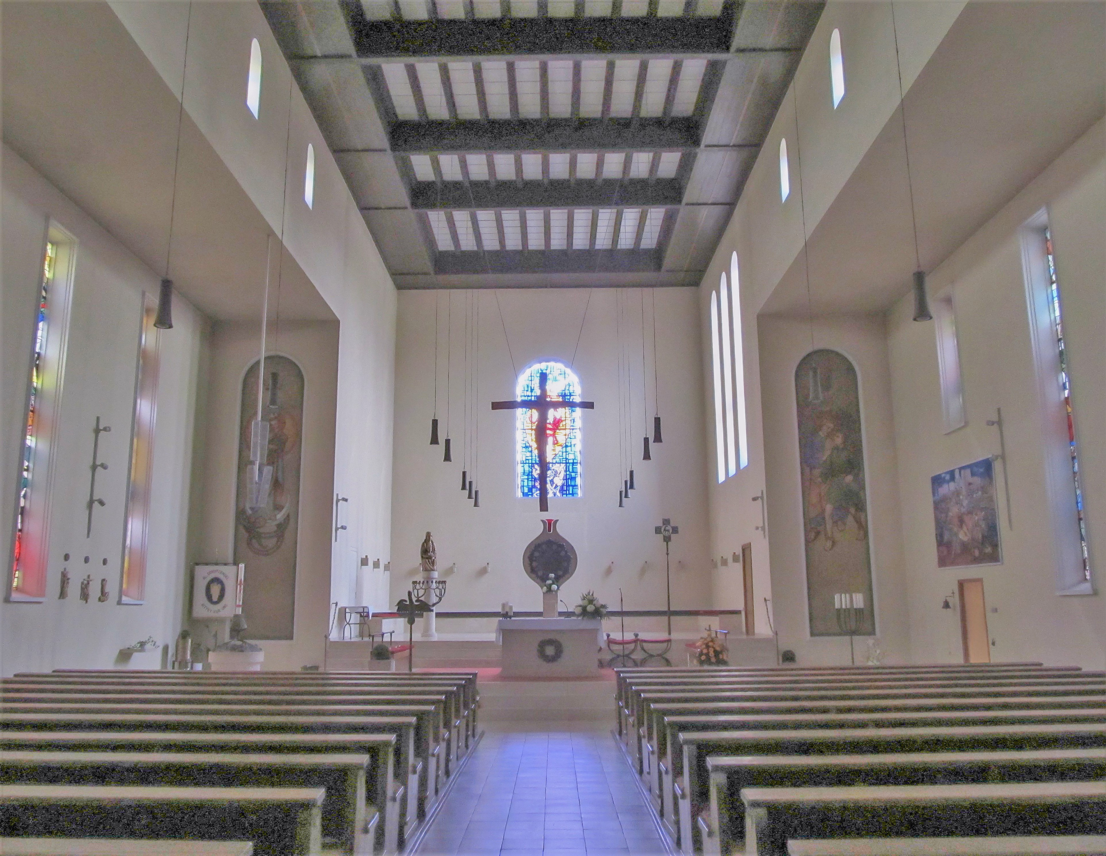 Blick ins Innere der katholischen Pfarrkirche „Zu den heiligen Schutzengeln“ in Schaffhausen, einem Ortsteil der Gemeinde Wadgassen, Saarland